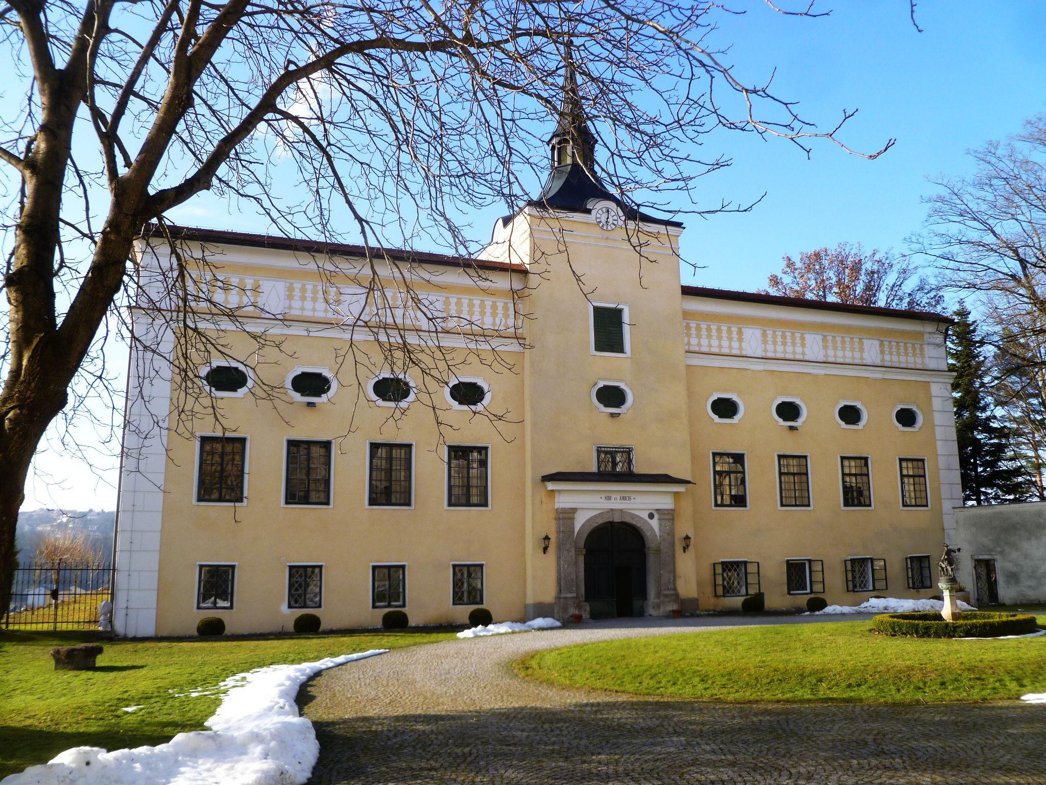 Schloss Kremsegg heute